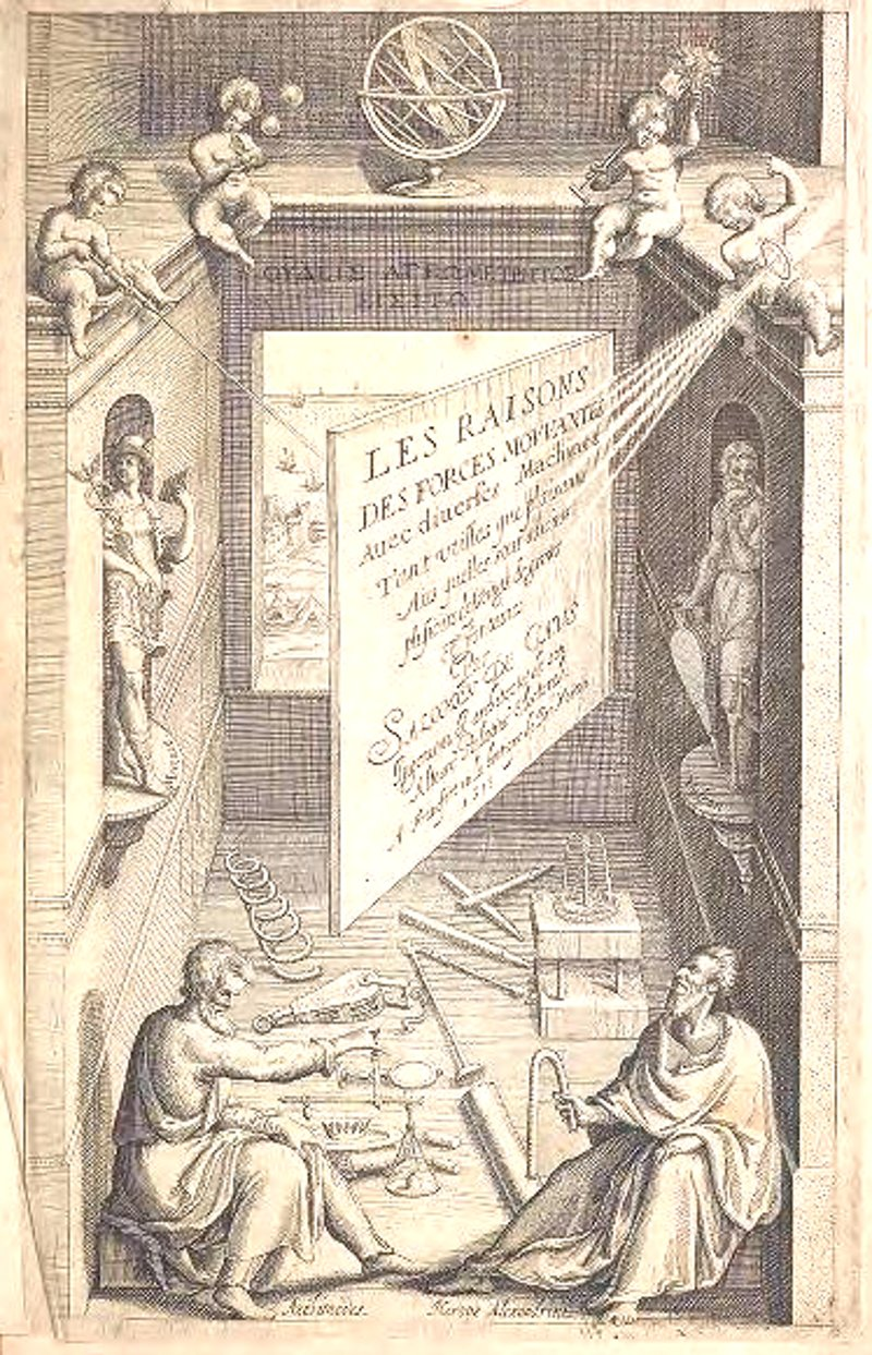 Salomon de Caus, Les raisons des forces mouuantes auec diuerses machines tant vtilles que plaisantes : aus quelles sont adioints plusieurs desseings de grotes et fontaines, 1615 : couverture.